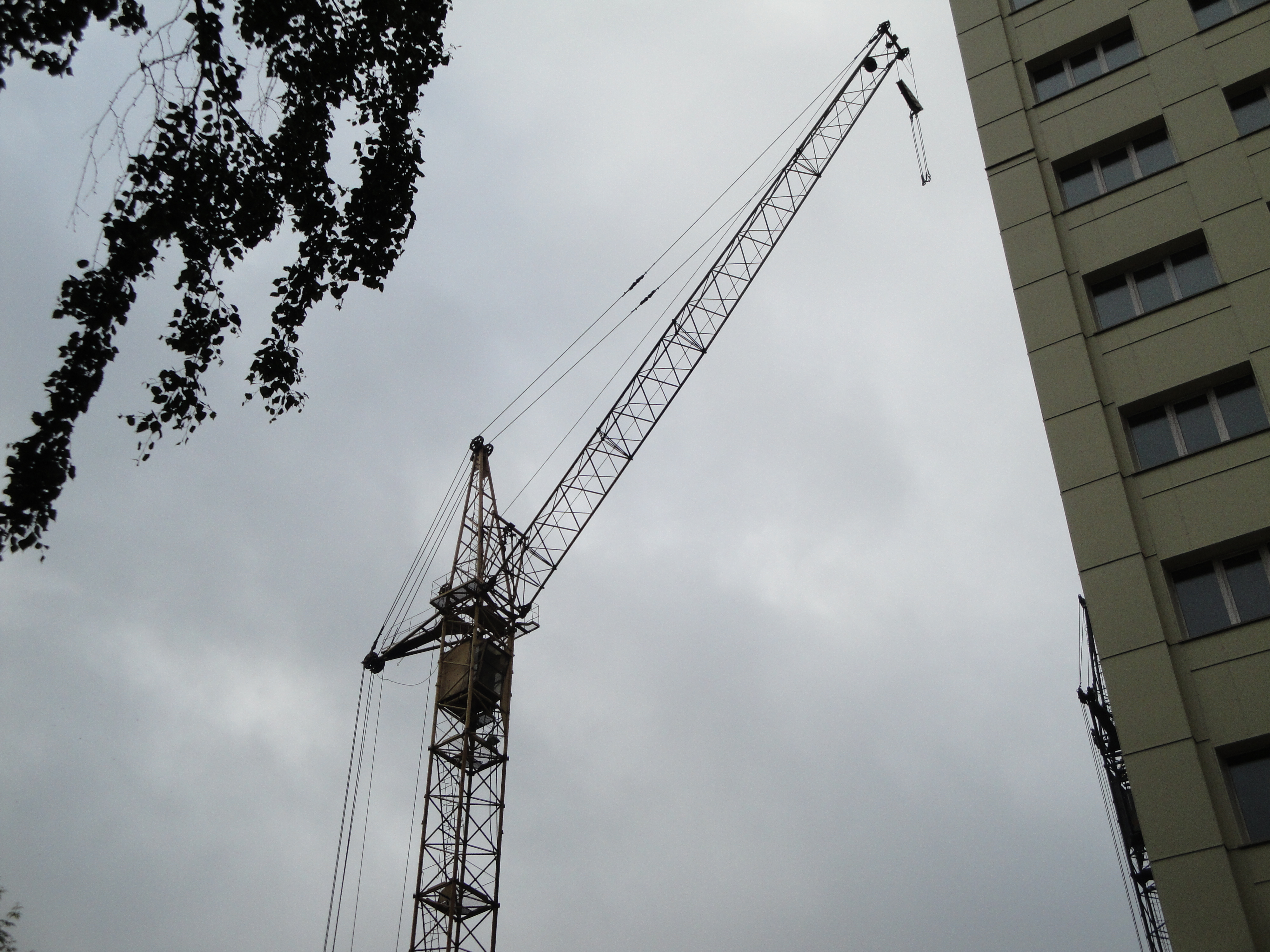 Кран КБ-405-1А на строительстве жилого дома - Новосибирск